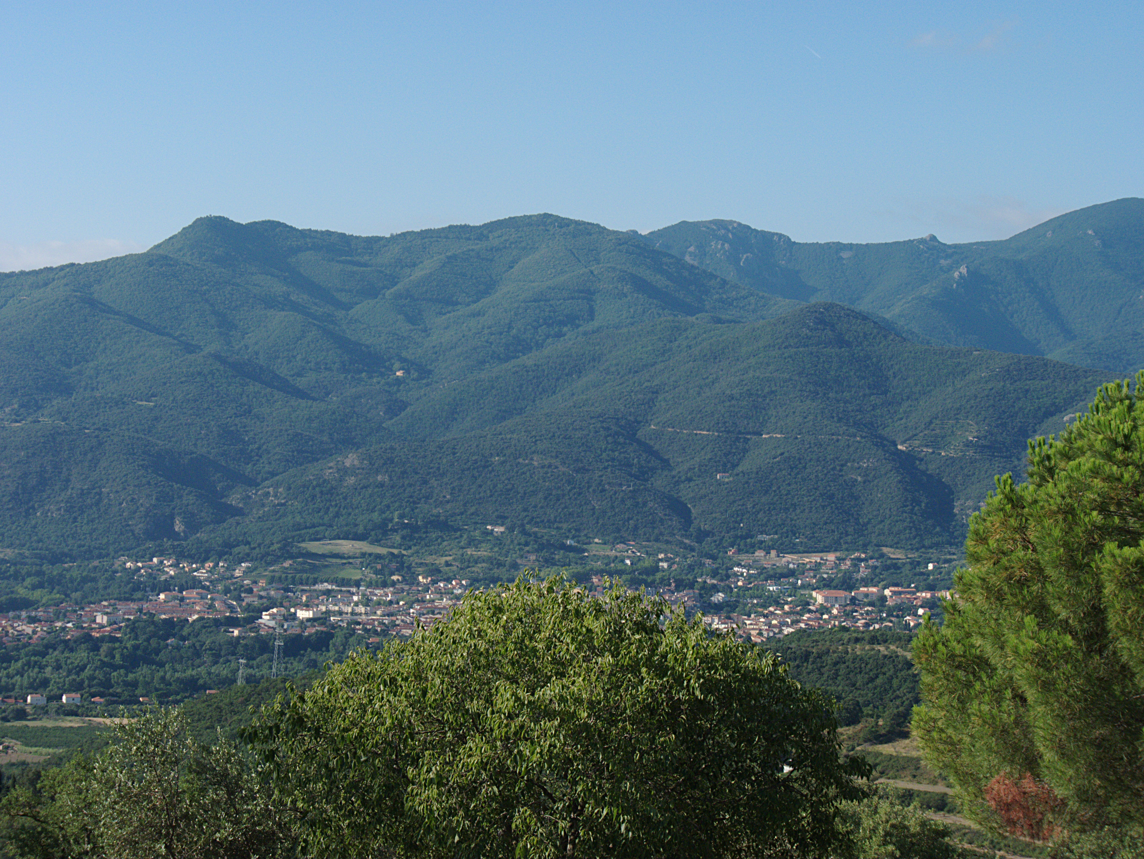 Puig de Fontfrede et les Salines depuis la chapelle Saint-Ferreol, Céret (Pyrénées-Orientales, Languedoc-Roussillon, France)